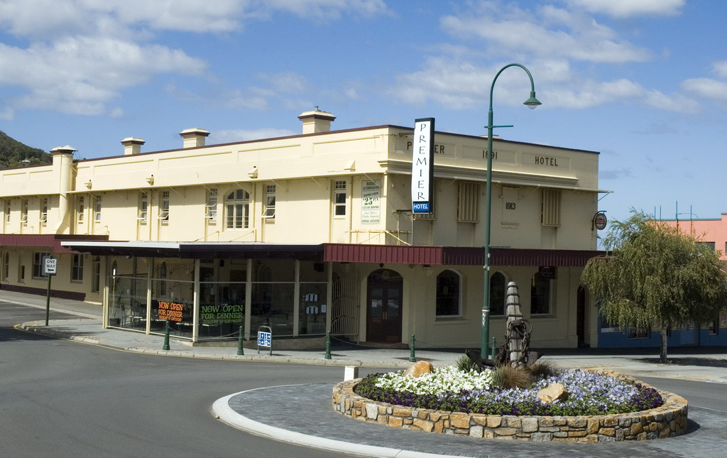 Premier Hotel - Albany, Western Australia.